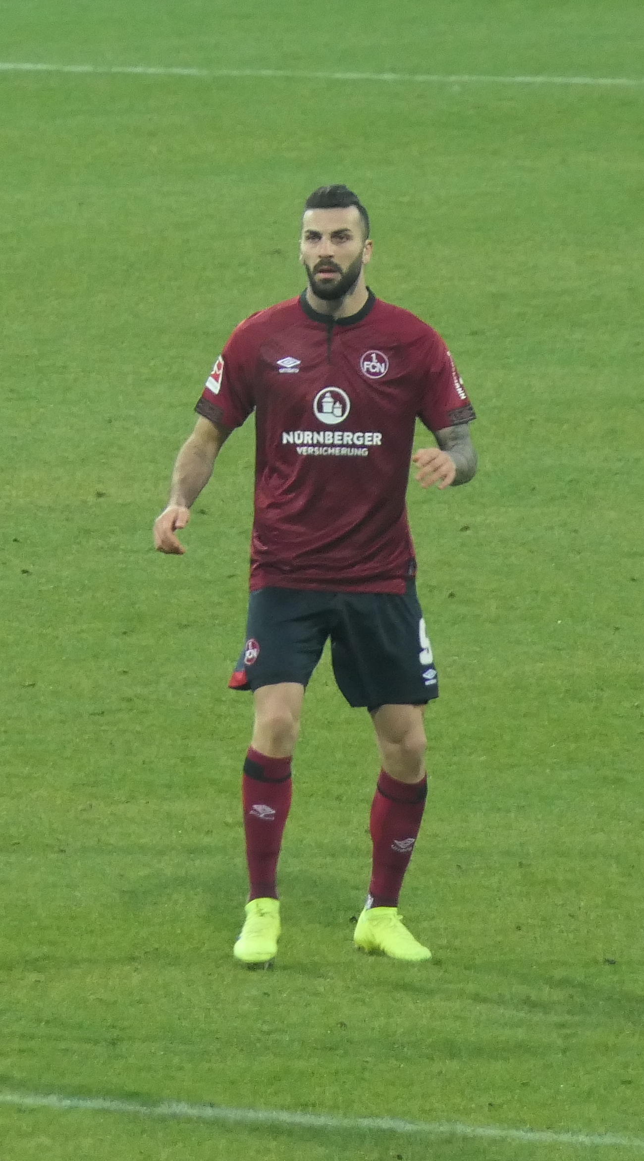 Der Fussballprofi Mikael Ishak vom 1.FC Nürnberg beim Heimspiel gegen Werder Bremen am 02.02.2019.